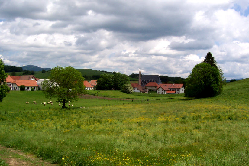 Panorama de/von/of Espinal, pueblo navarro / navarrisches dorf / navarran village